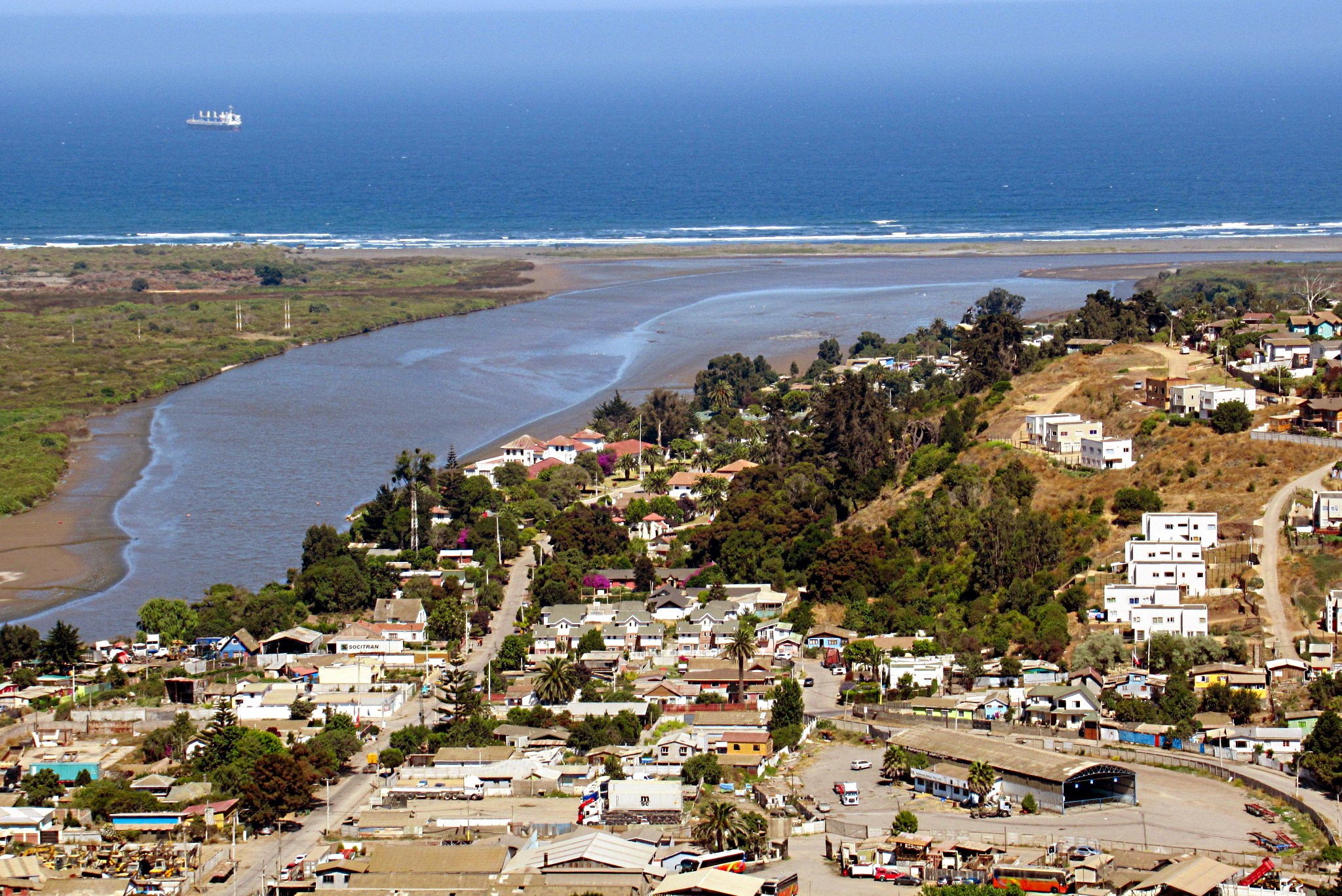 Vista desde el mirador del Museo de Historia Natural e Histórico de San Antonio (MUSA) hacia la desembocadura del Río Maipo.